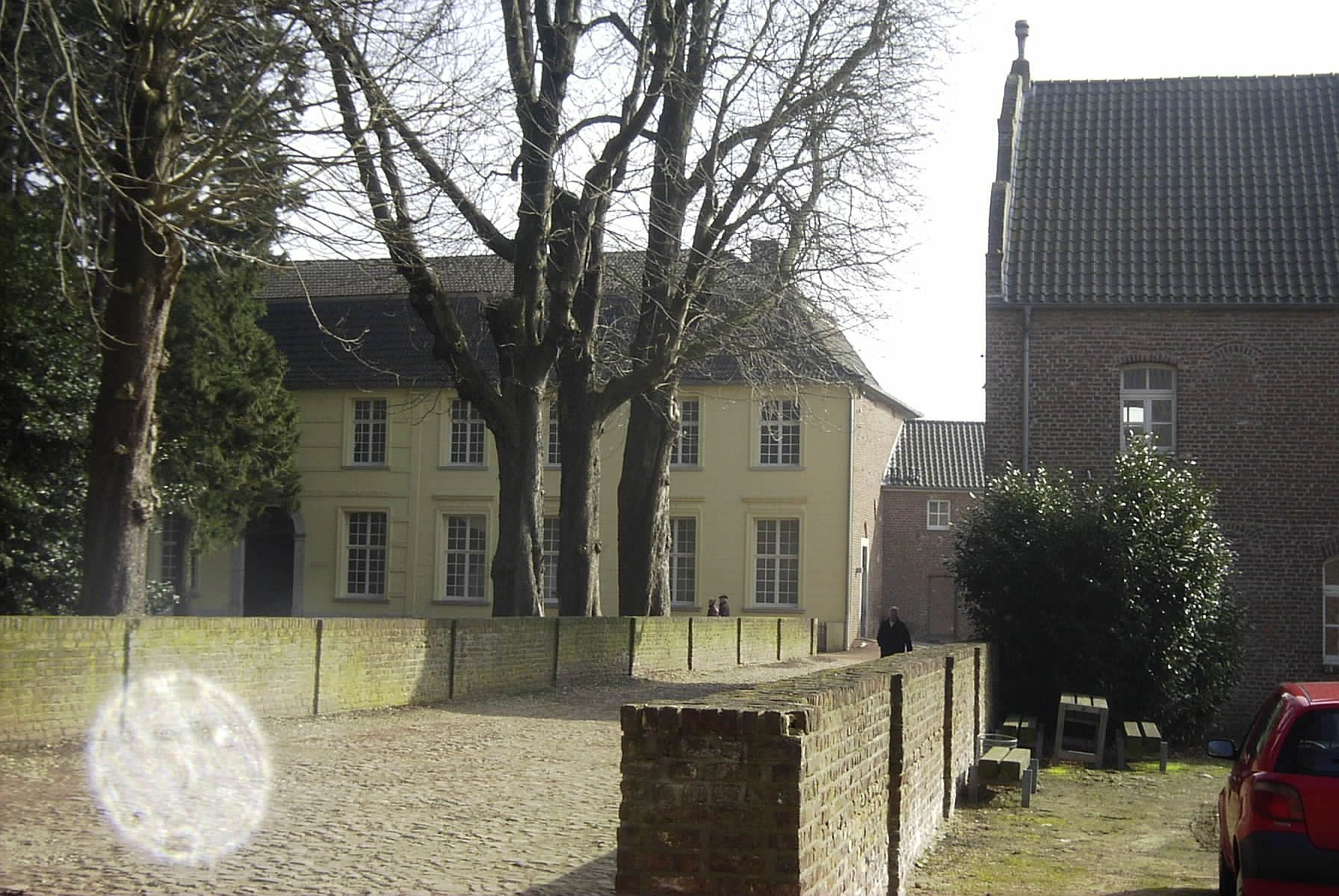 Summary Herrenhaus Nordseite(links) und Laienbruderhaus (rechts) eigenes Foto März 2006 mfg Bodoklecksel 15:39, 19. Mär 2006 (CET)